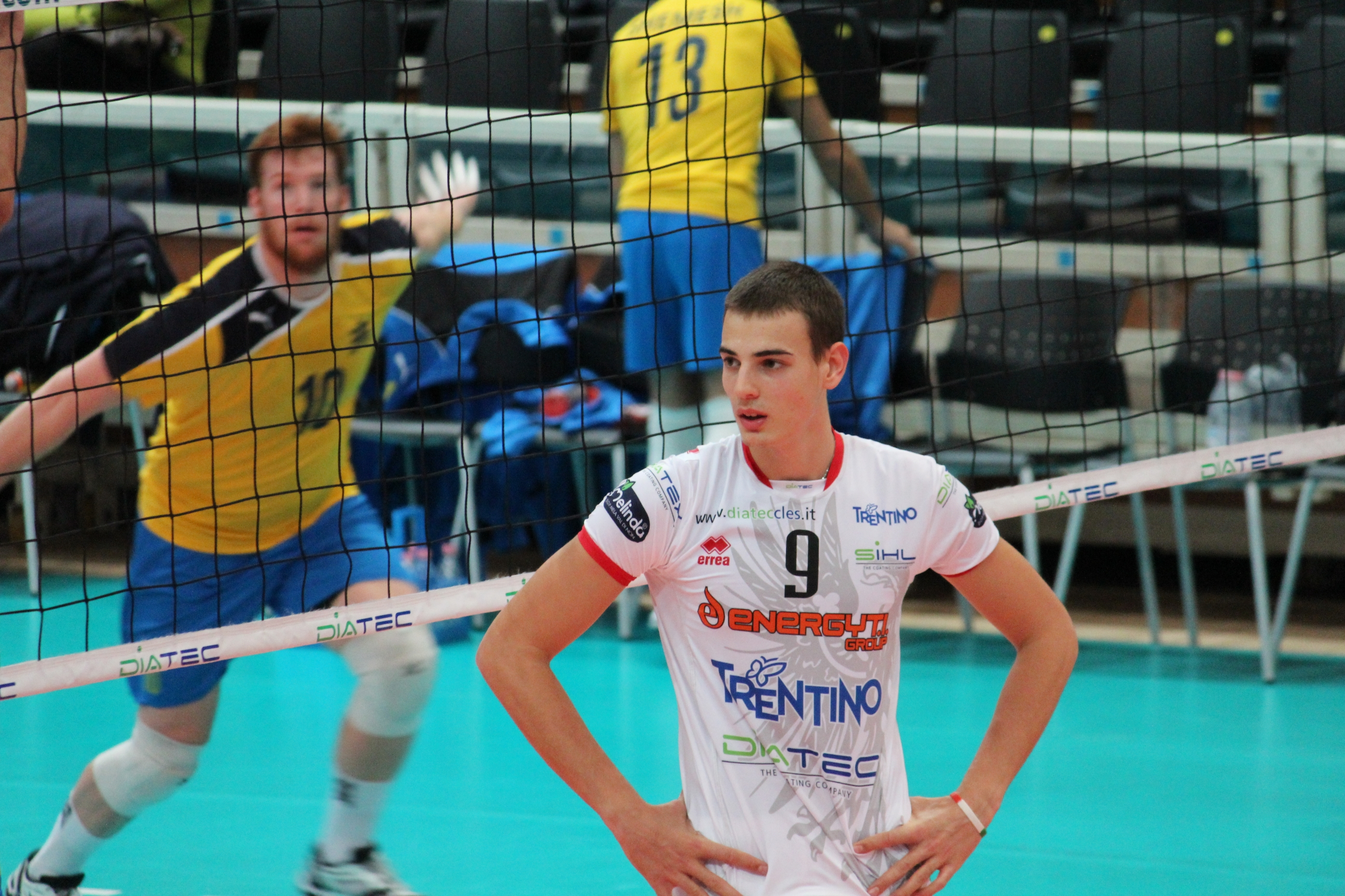 Simone Giannelli durante un riscaldamento pre-partita